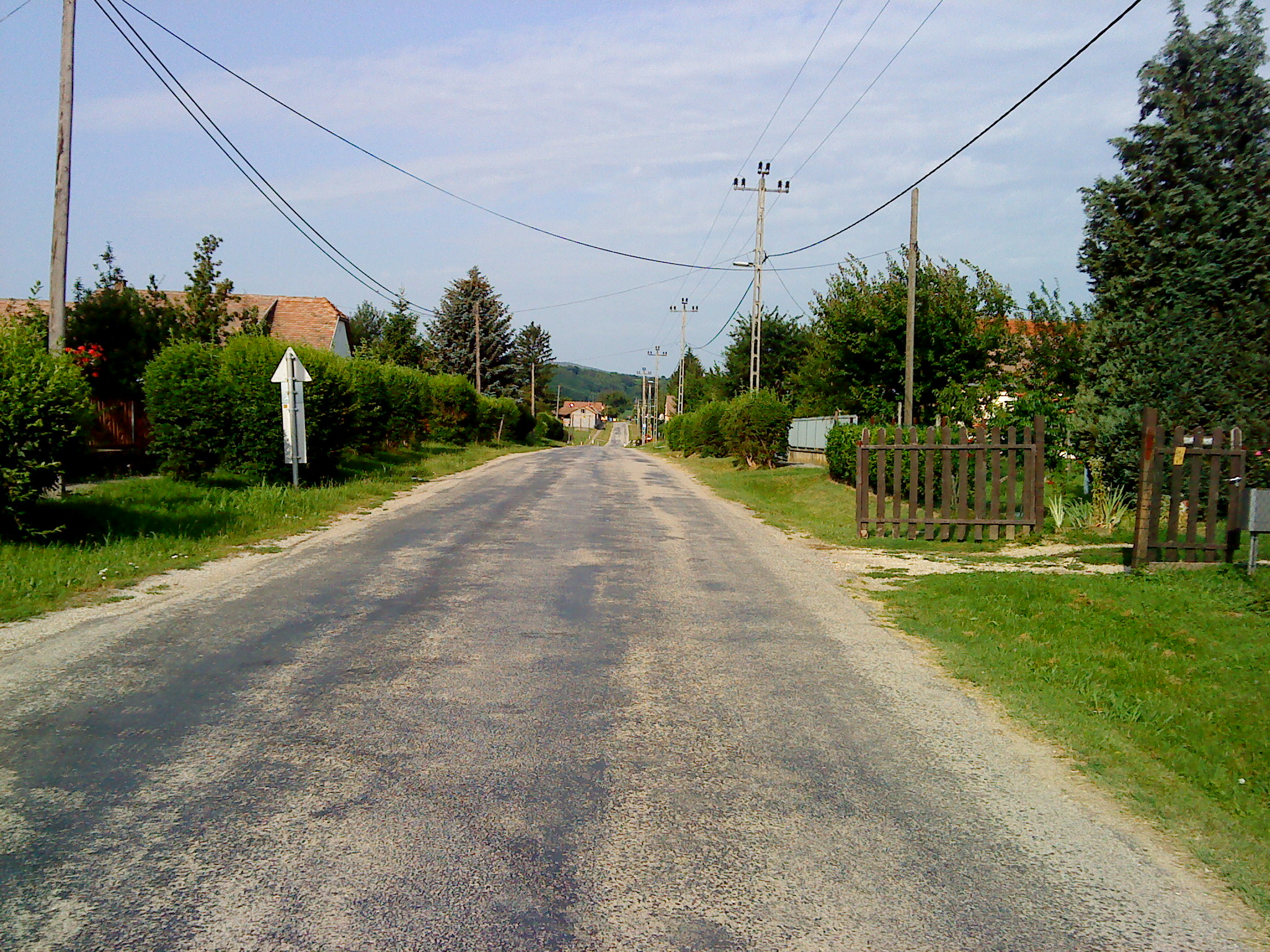 Dózsa György utca, Kistótfalu